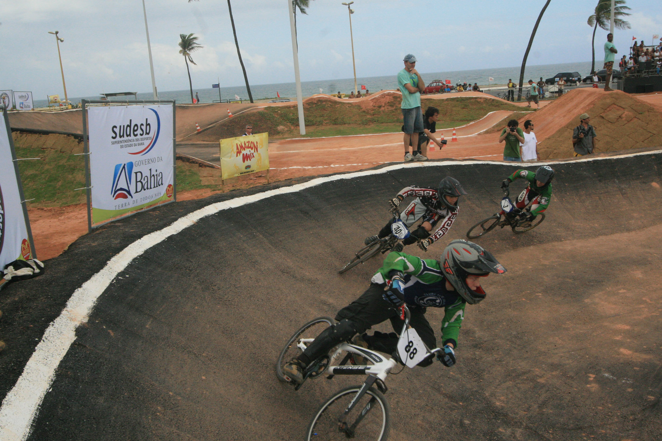 Cerca de 500 atletas de 14 estados do Brasil, divididos em 38 categorias, participaram das competições realizadas desde o último dia quatro. Foto: Aristeu Chagas / AGECOM